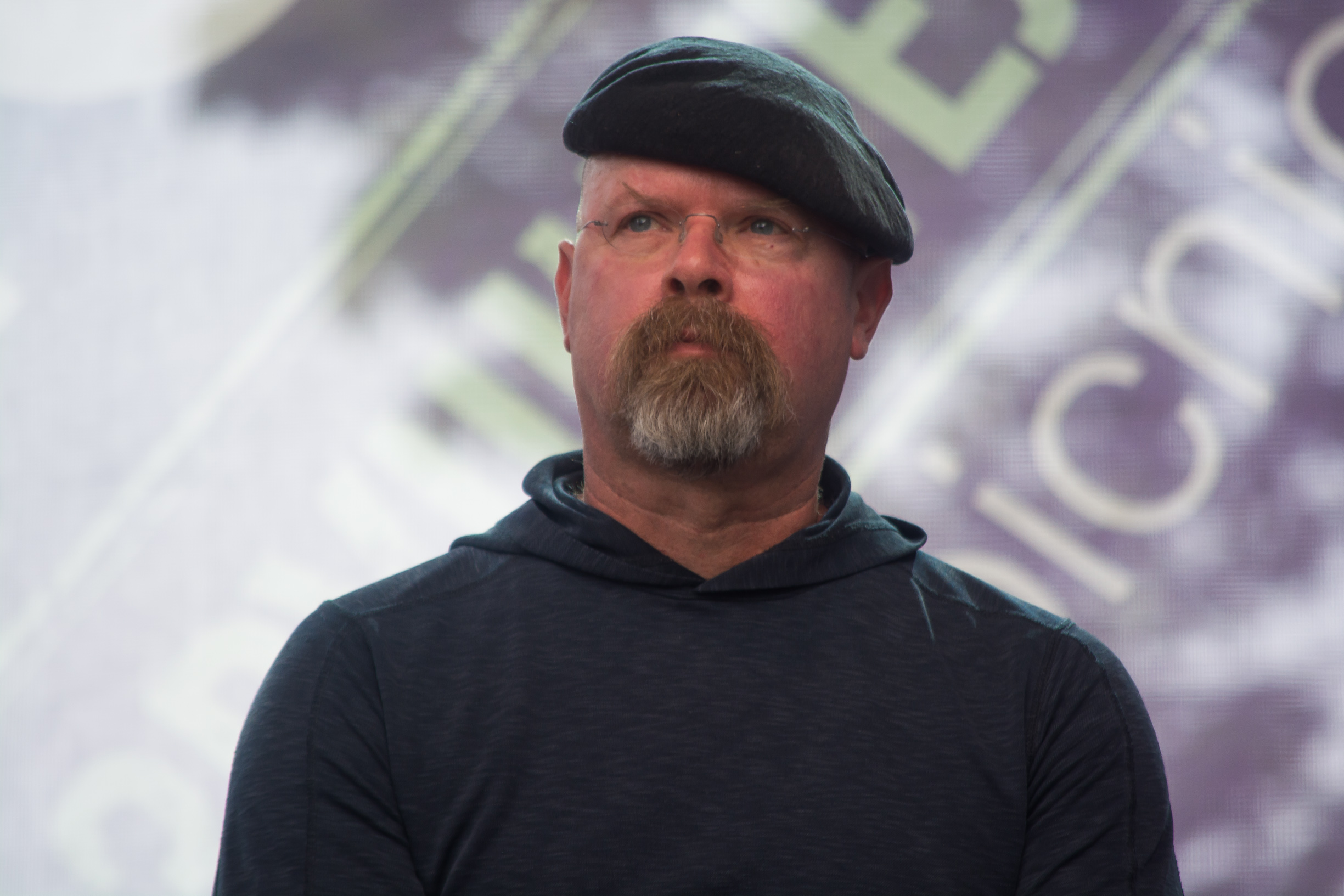 Джейми Хайнеман (Jamie Hyneman) на Geek Picnic 2016 в Санкт-Петербурге